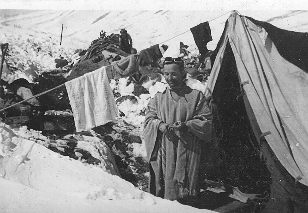 Victorio Angelelli en campaña, en la cordillera de Los Andes, Argentina.